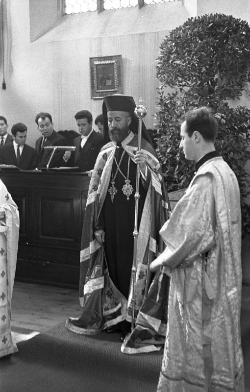 Staatsbesuch Zypern Messe in der griechisch-orthodoxen Kirche 26.-27.5.1962